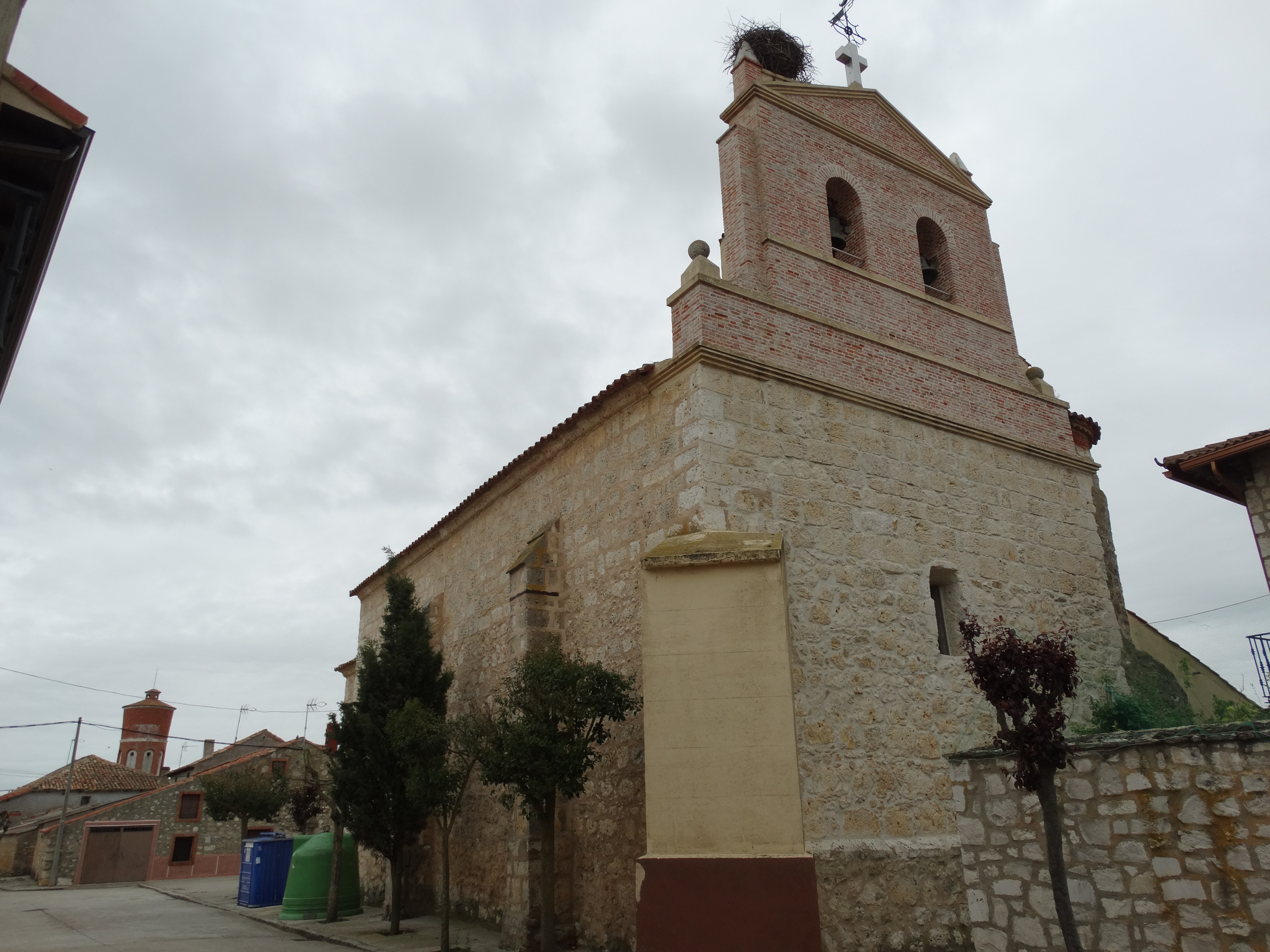 La Mudarra (Valladolid, España). Iglesia parroquial de Nuestra Señora del Rosario del siglo XVIII, barroca. Espadaña.